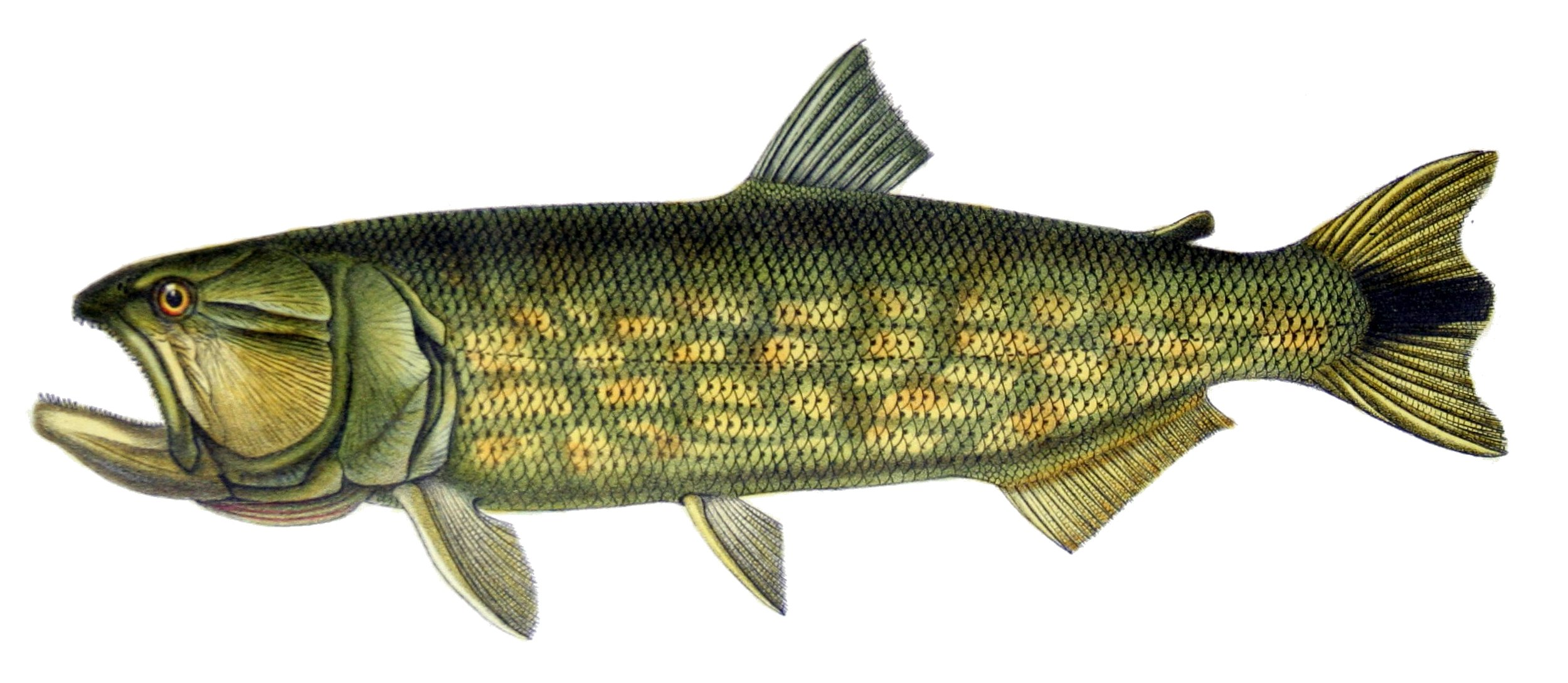 Salminus maxillaris Cuv. Val. = Salminus brasiliensis (Cuvier, 1816)